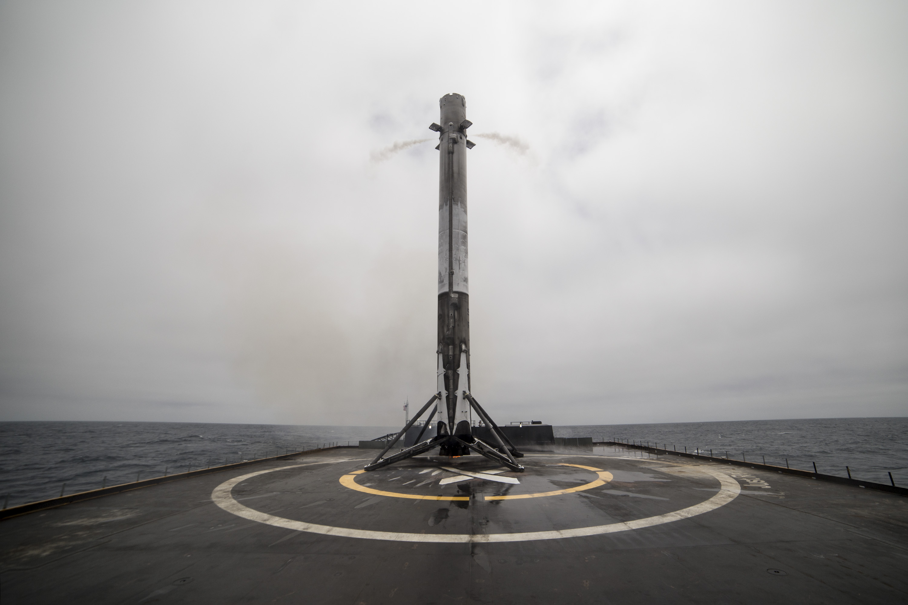 Iridium-2 Mission